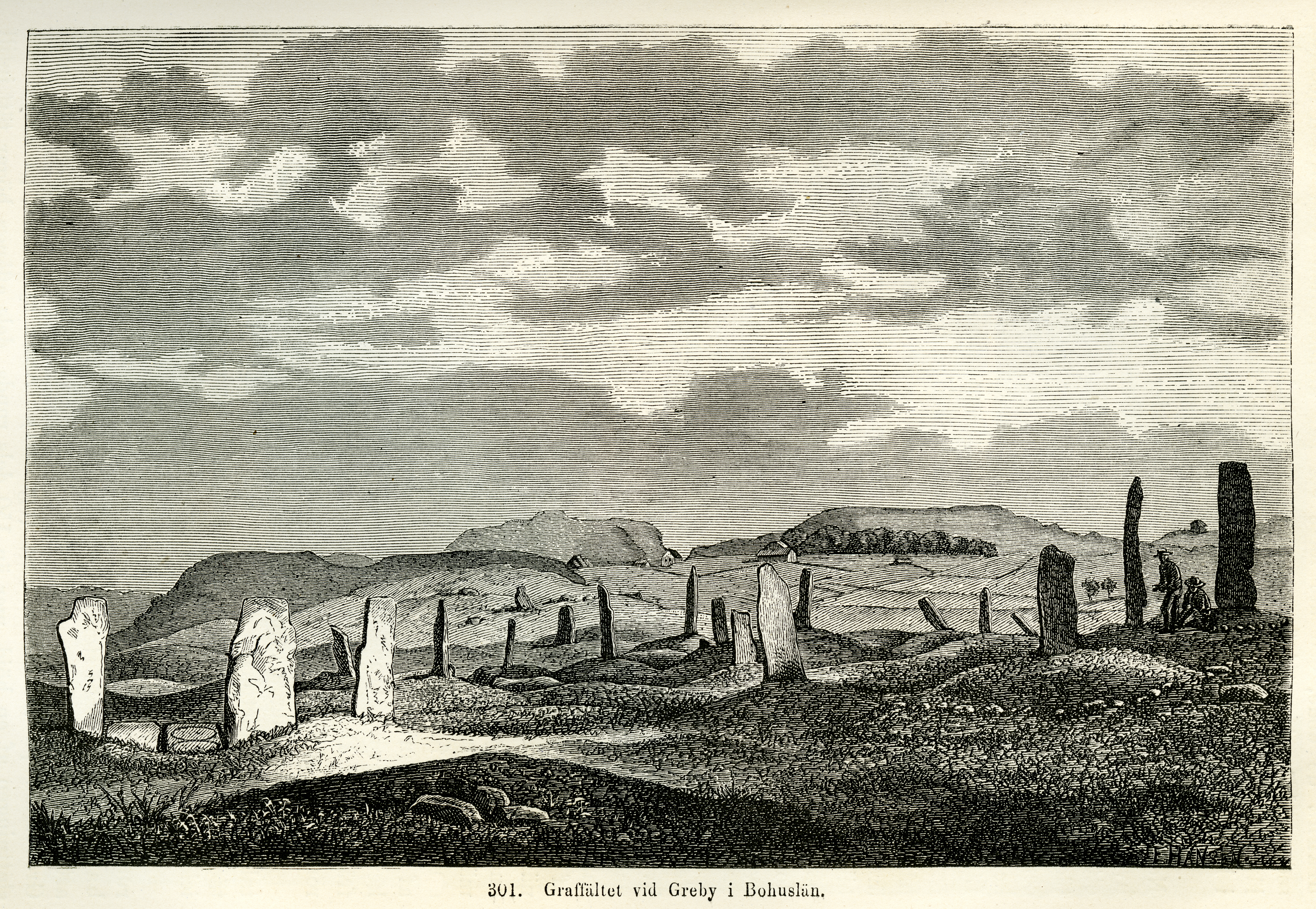 Greby gravfält (RAÄ-nummer 734:1) i Tanums socken, Tanums härad, Tanums kommun, Bohuslän, Västra Götalands län, Sverige. Träsnitt av Evald Hansen ur Sveriges hednatid samt medeltid (1877) av Oscar Montelius.